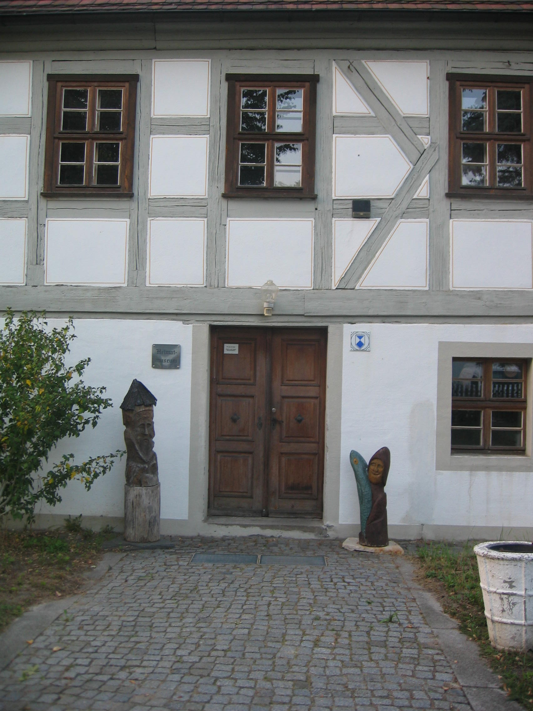 Gutshaus in Ruhland, Eingangsbereich mit Holzfiguren rechts und links, geschaffen von Rudolf Schulze; der Gutshof ist denkmalgeschützt